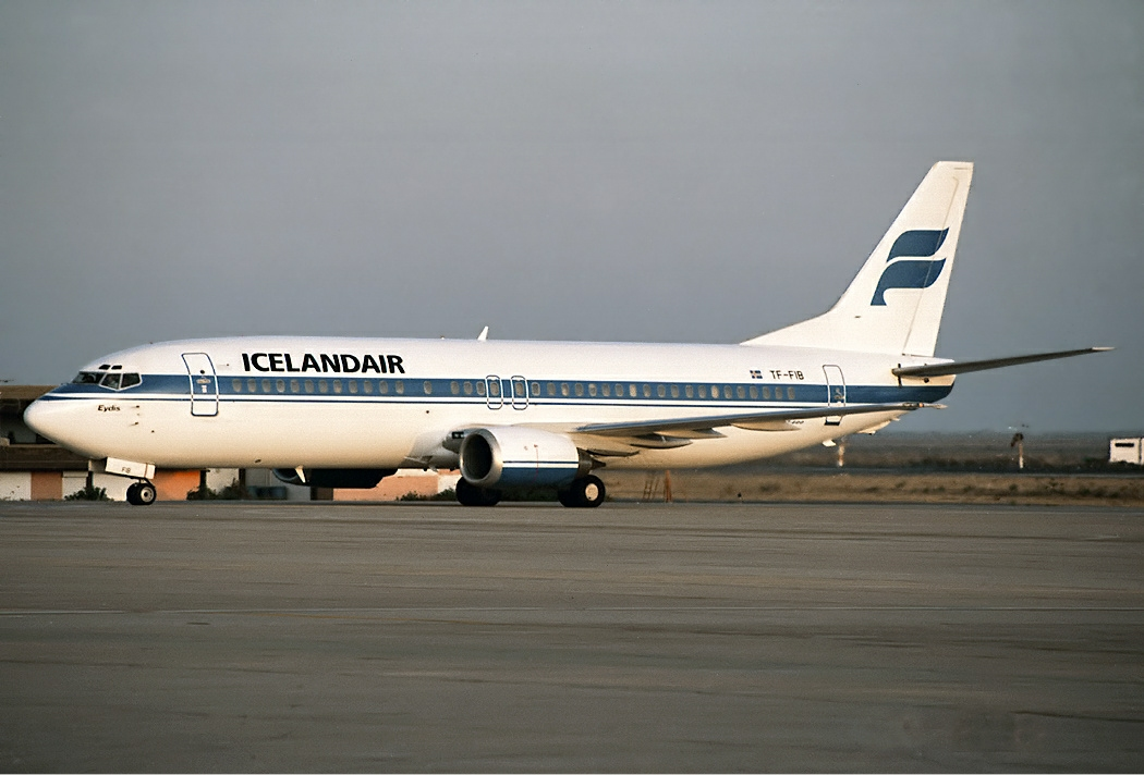 Icelandair Boeing 737-408